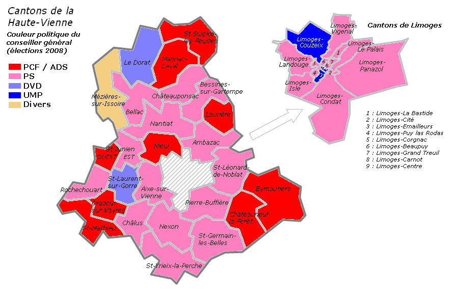 Carte des cantons de la Haute-Vienne, avec le nom du canton et la couleur politique du conseiller général